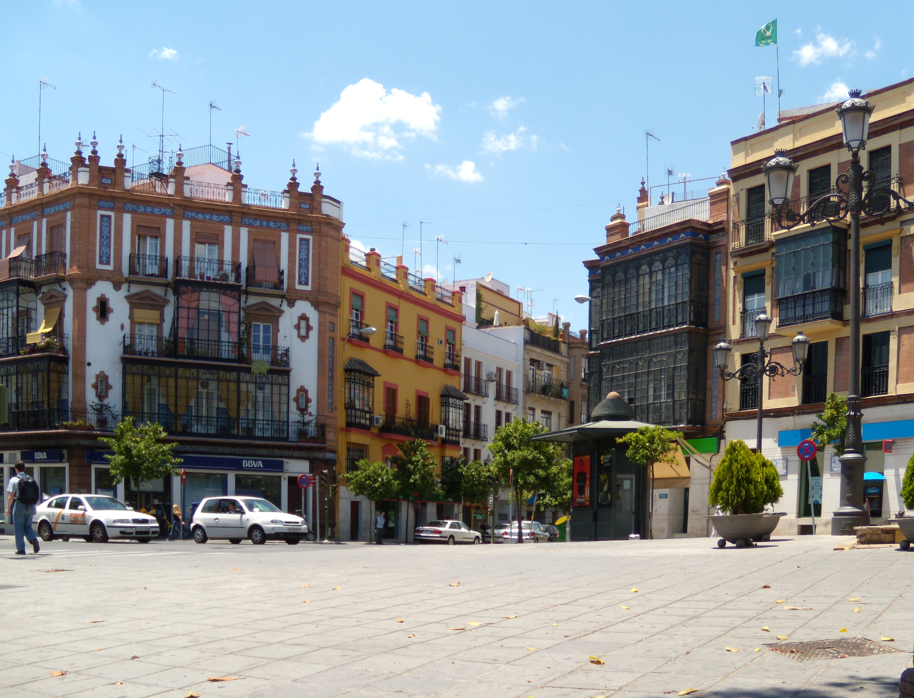 La Plaza del Altozano de Sevilla, en el barrio de Triana